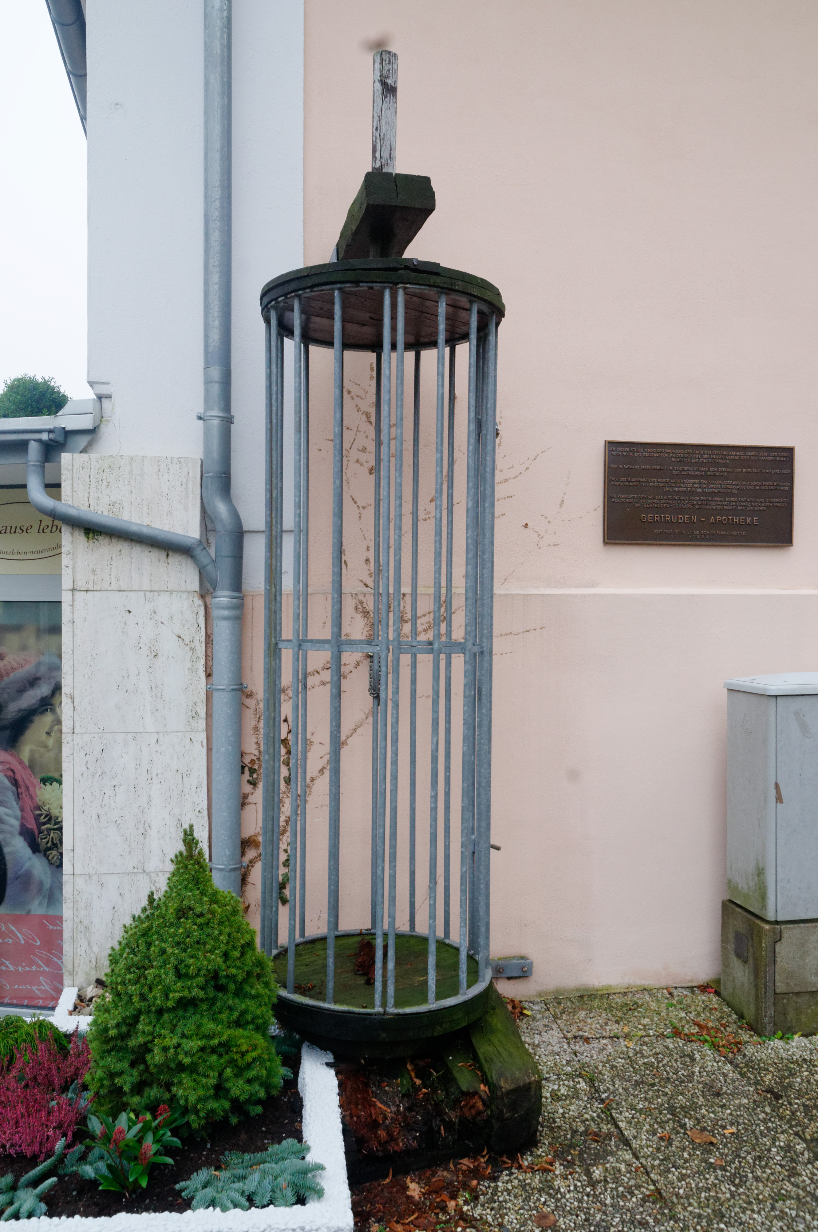 Rekonstruktion eines Drehhäuschens in Neuenrade